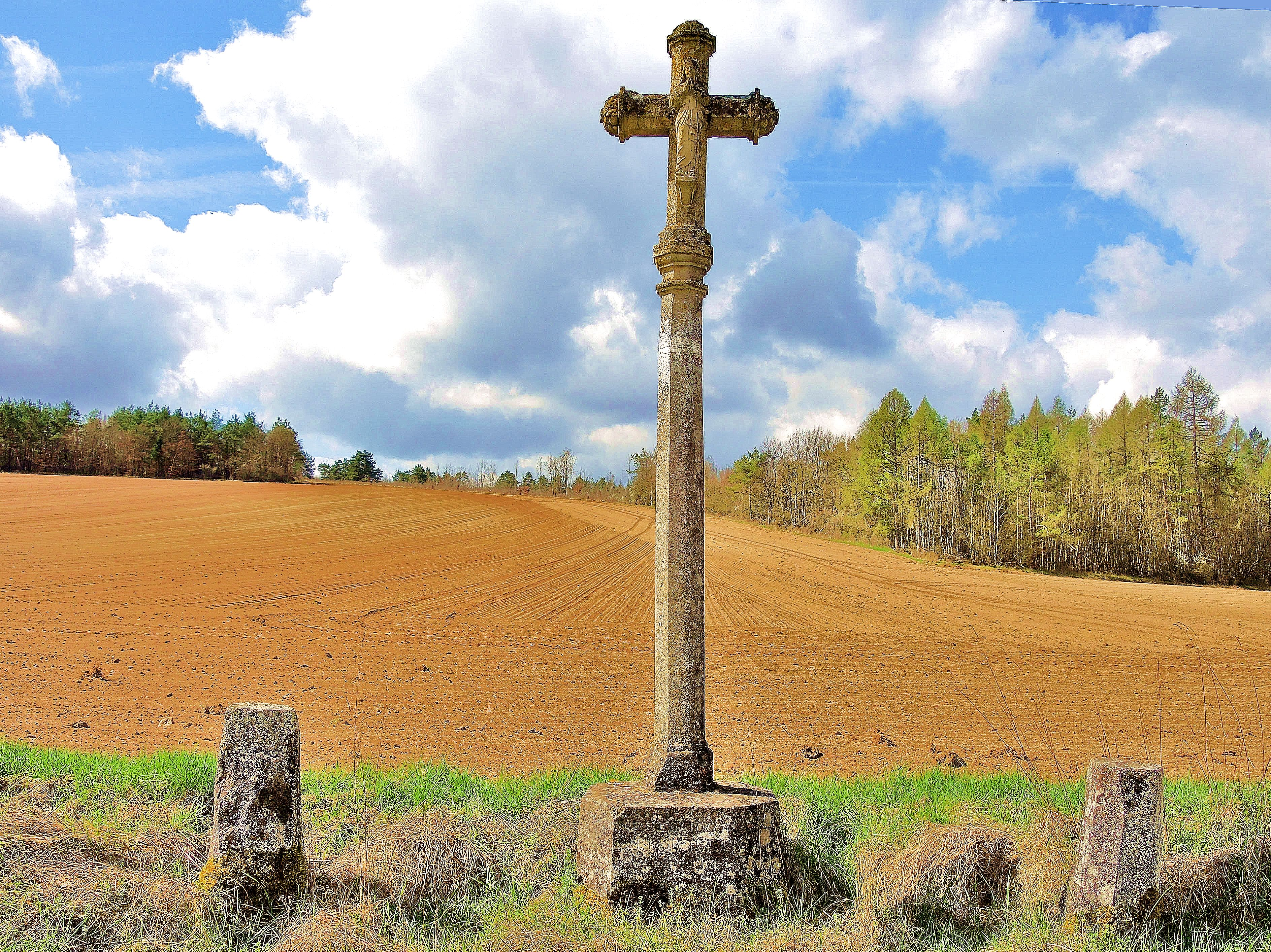 Vanvey. Croix de chemin au lieu-dit moulin du haut.